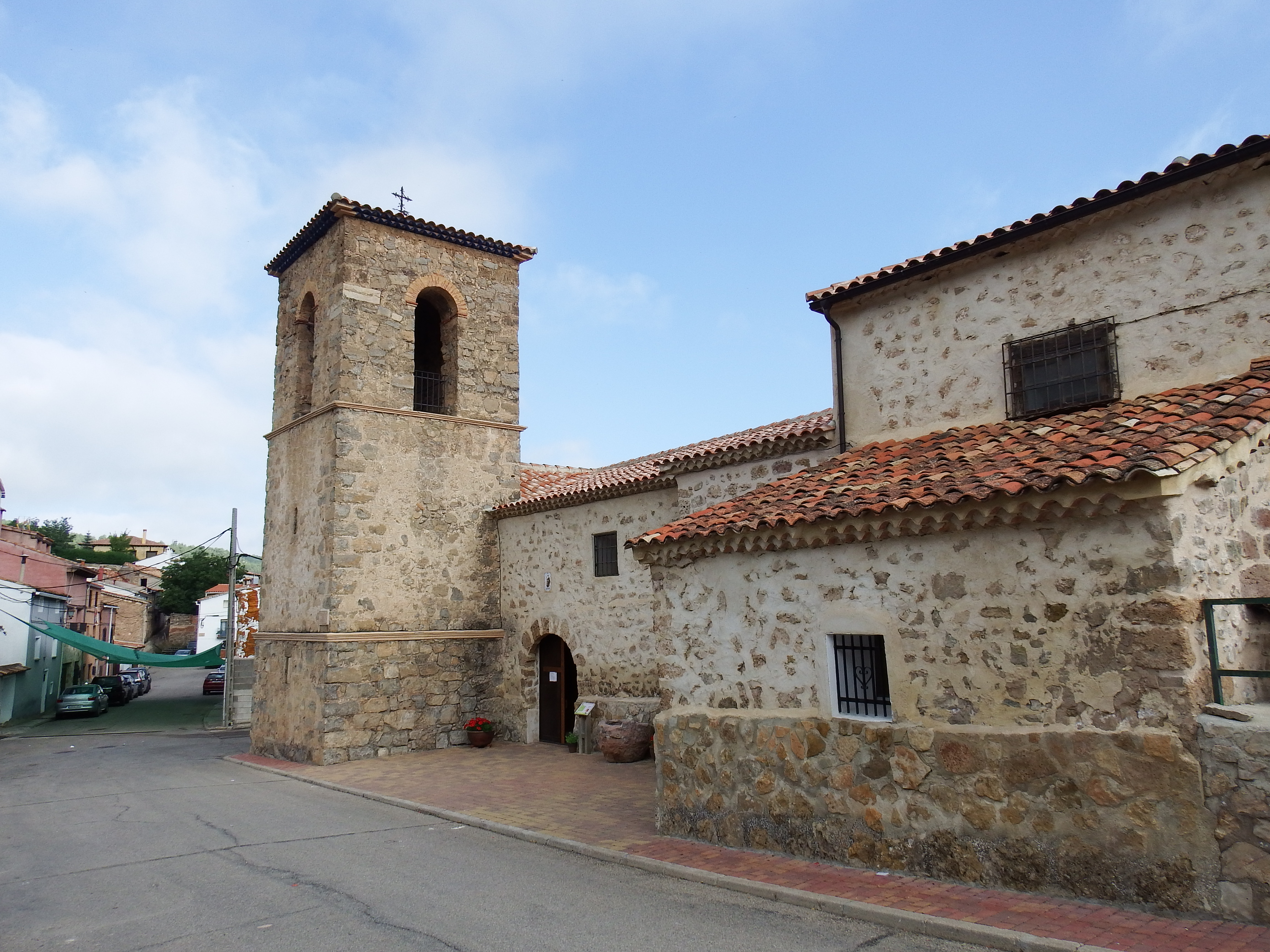 Iglesia parroquial de Santiago en Beamud.